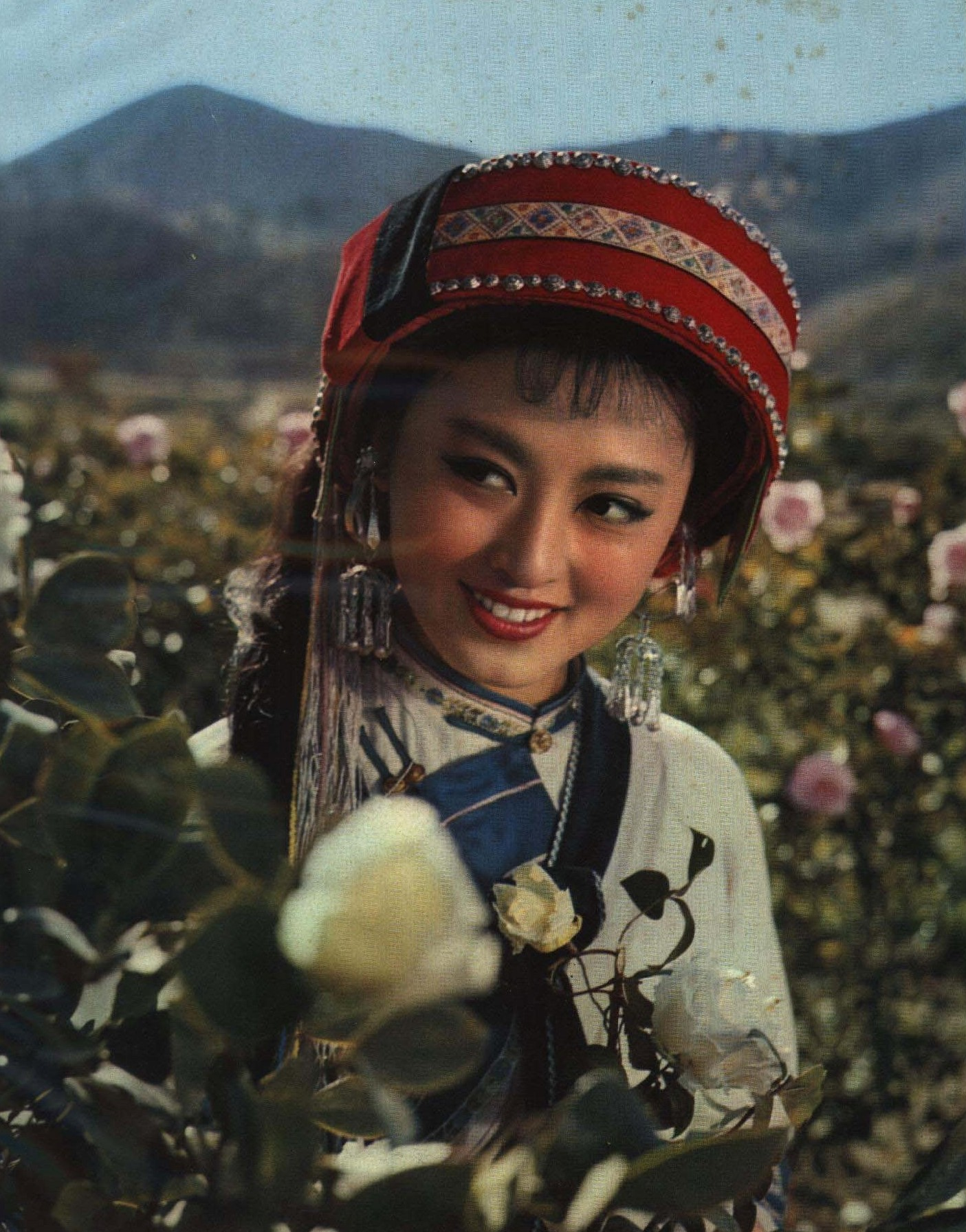 1964-01 1964年 电影阿诗玛演员杨丽坤